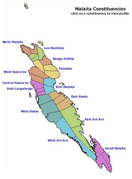 Wahlbezirke und Verwaltungsbezirke auf Malaita, Salomonen, Melanesien, Südpazifik